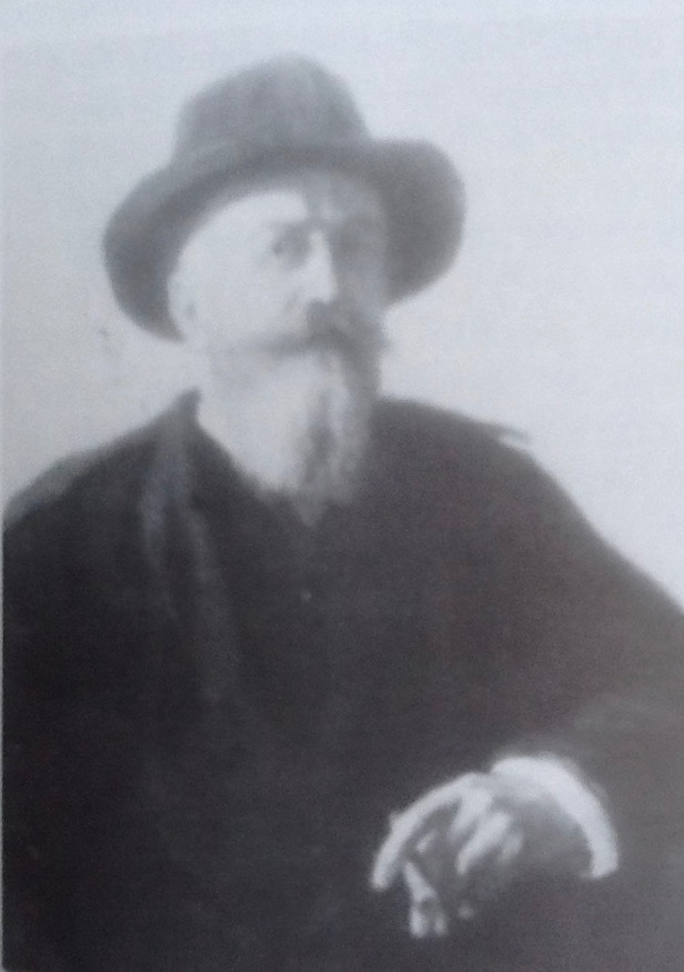 Evangelischer Theologe, Pfarrer in Lothringen und Biebrich am Rhein